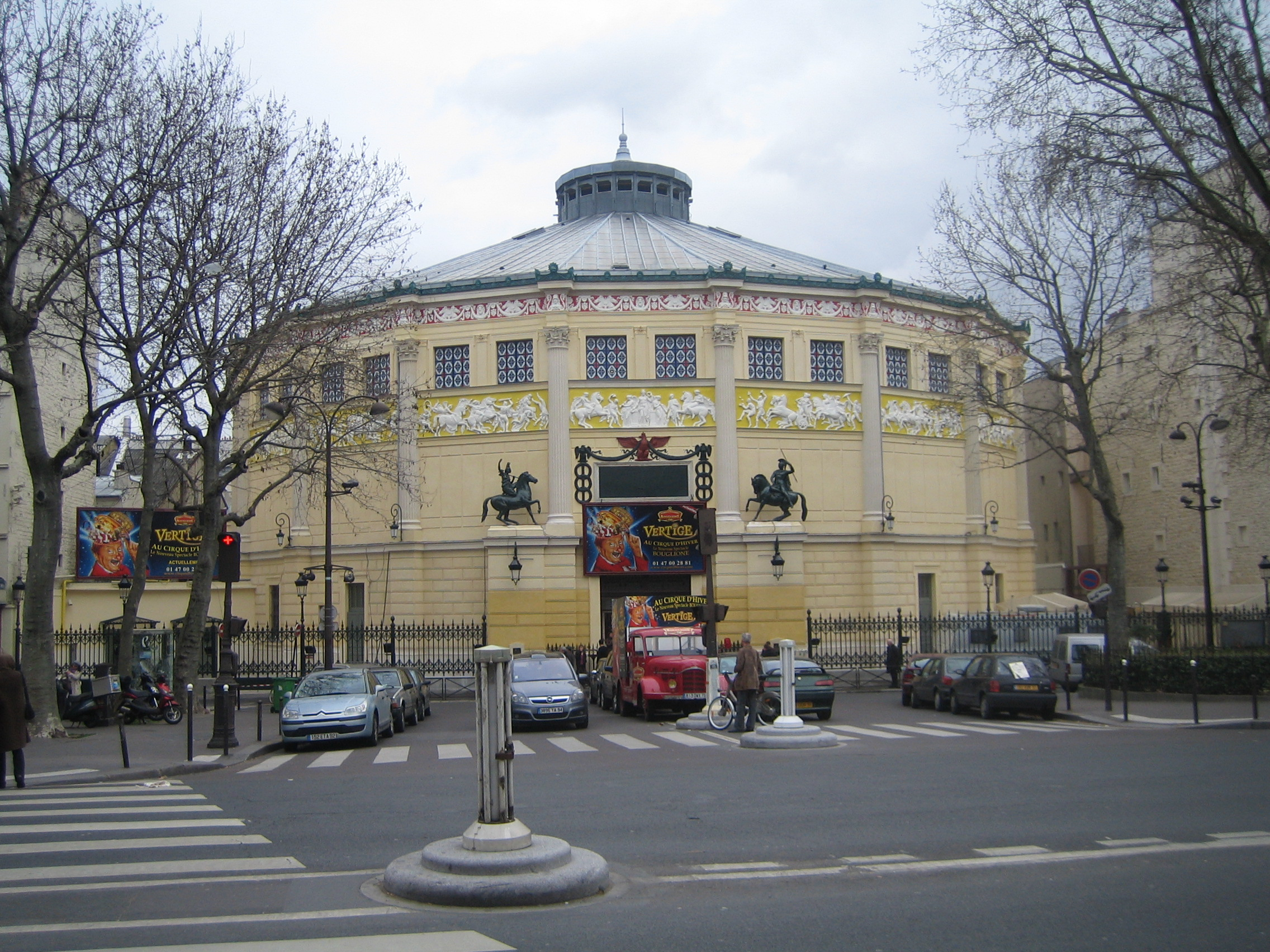 Le cirque d'hiver, rue Amelot, à Paris.